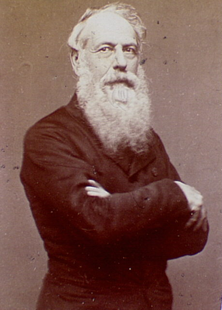 Jules Miot (1809-1883)